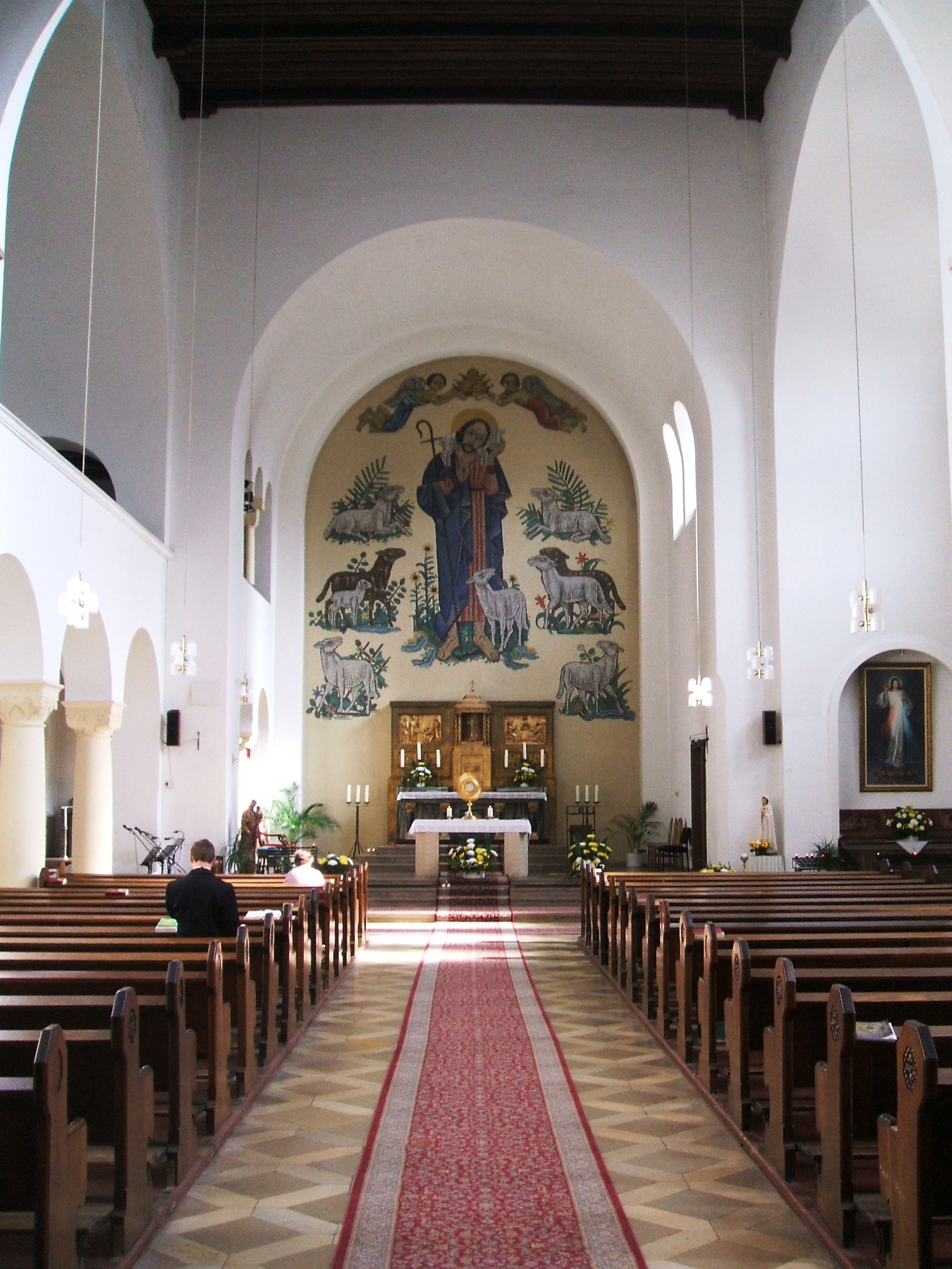 St. Clemens Berlin-Kreuzberg, Exerzitienzentrum der Göttlichen Barmherzigkeit für die Reevangelisation, Kirche